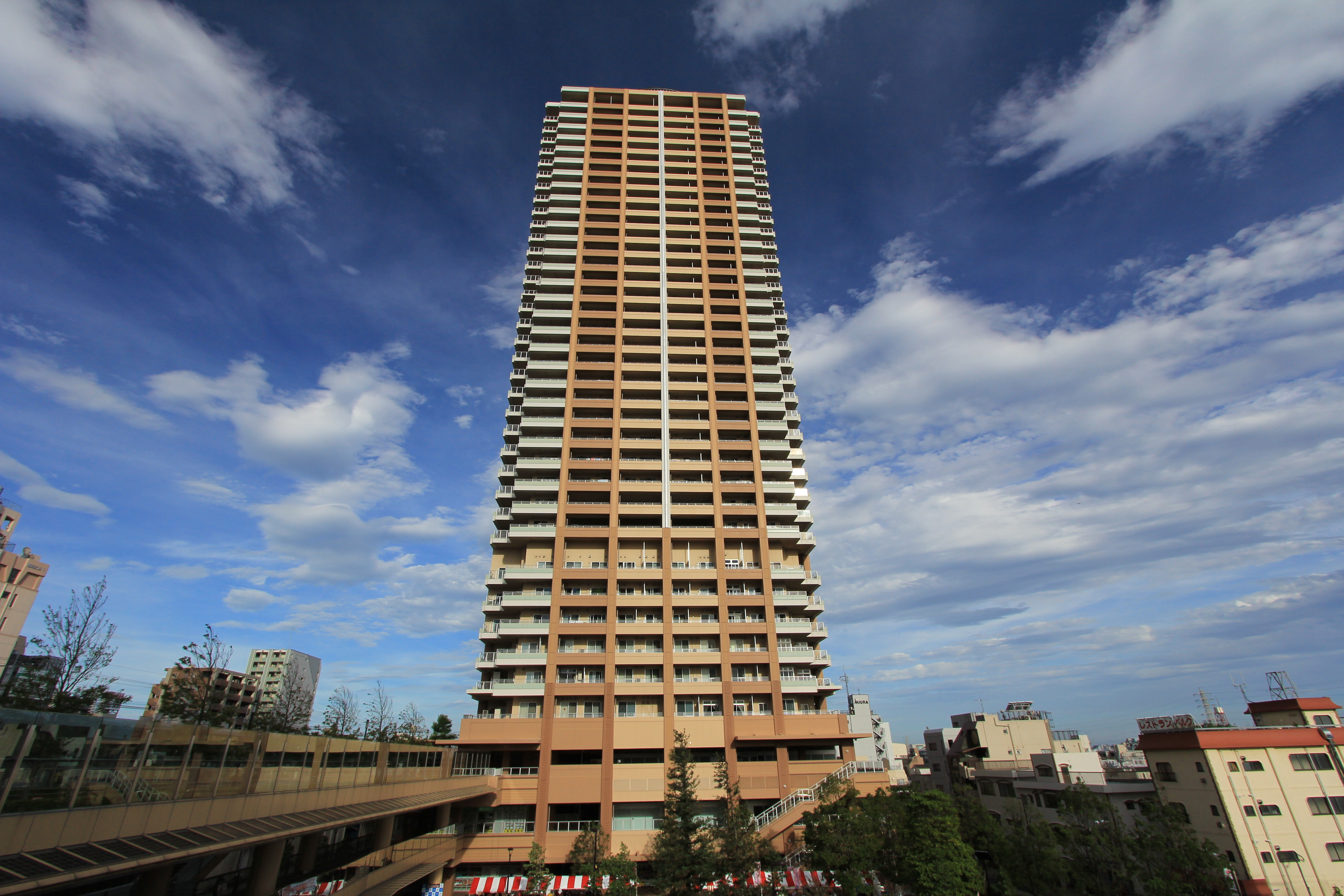 市川アイリンクタウン